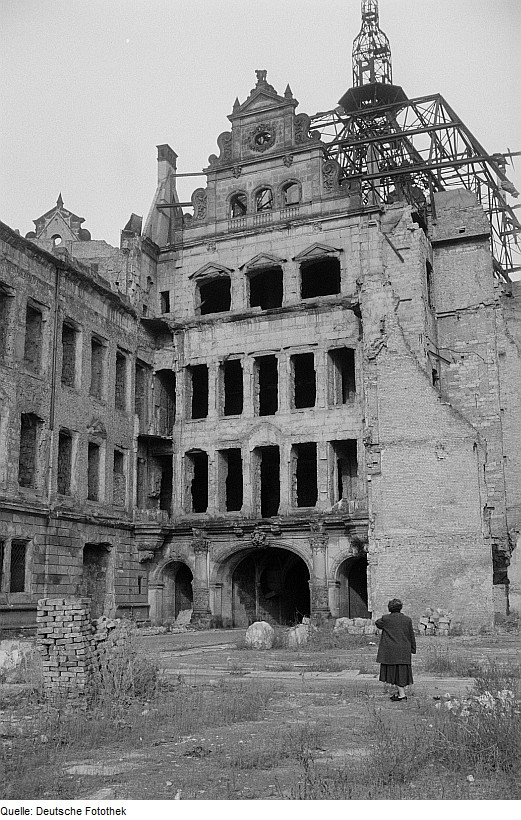 Original image description from the Deutsche FotothekMutter Roger Rössings vor dem zerstörten Georgentor